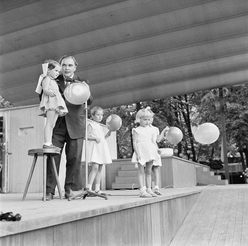 "Kungsträdgården. Rolf Bergström ifrån Radiotjänst samtalade med barn på scen, för att få fram en barnröst som skulle vädja om stöd åt Barnens dags verksamhet på biografer, under hösten" (Citatkälla: Stockholmskällan